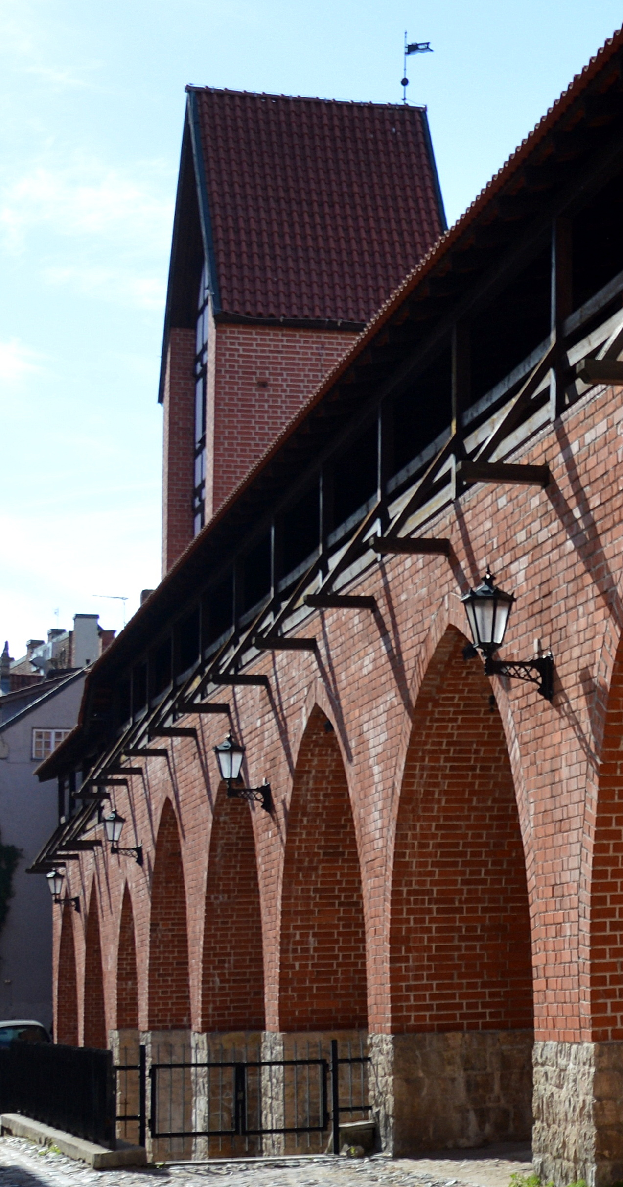 Ramerturm in Stadtmauer Riga 2018